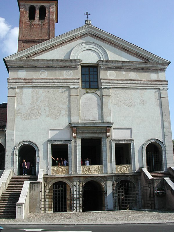 Tempio di San Sebastiano a Mantova Source: photo uploaded by User:RicciSpeziari. Photographer: Riccardo Speziari